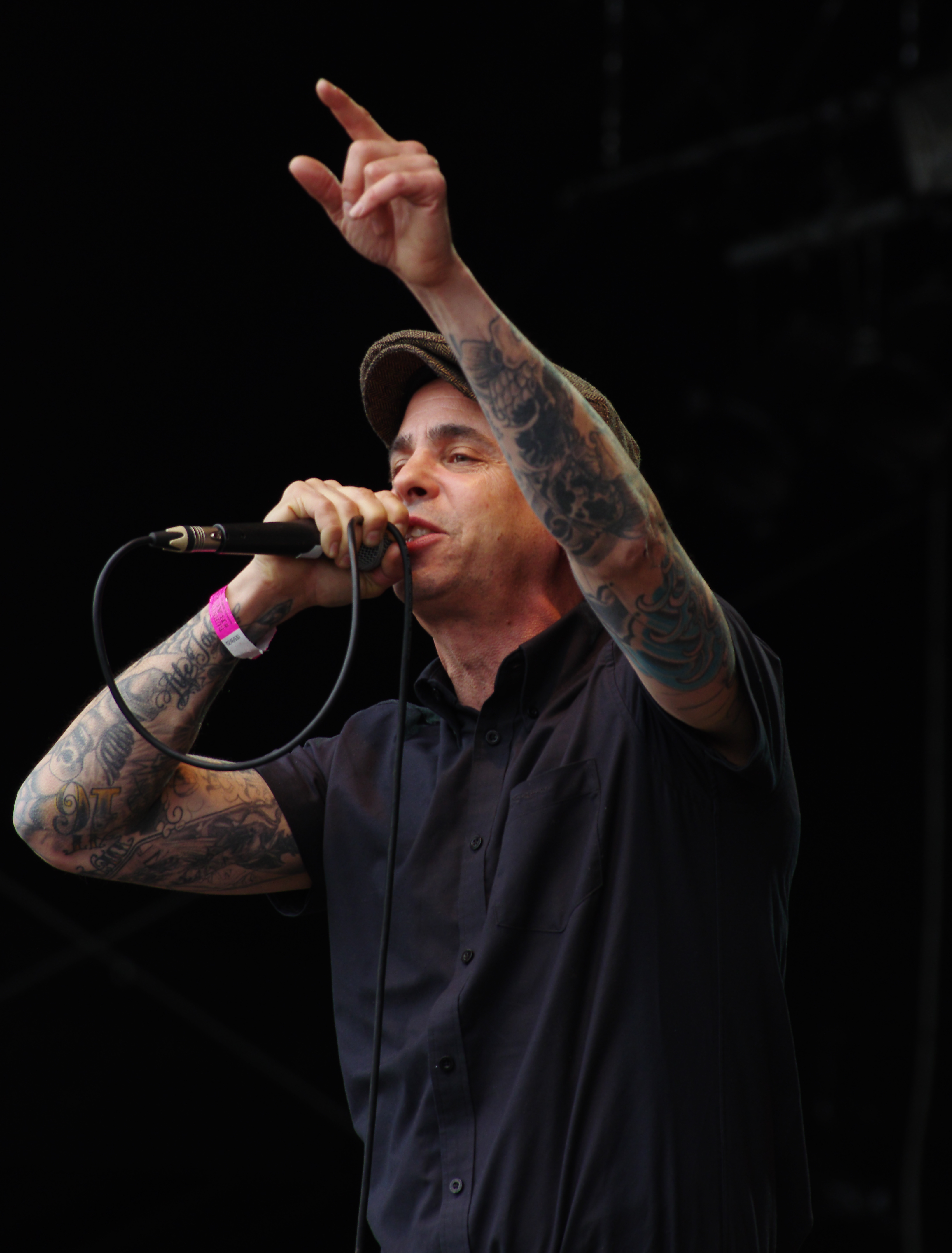 The Generators, Punkrockband aus Los Angeles, Auftritt beim Ruhrpott Rodeo 2013 in Hünxe. Doug Dagger (vocals)